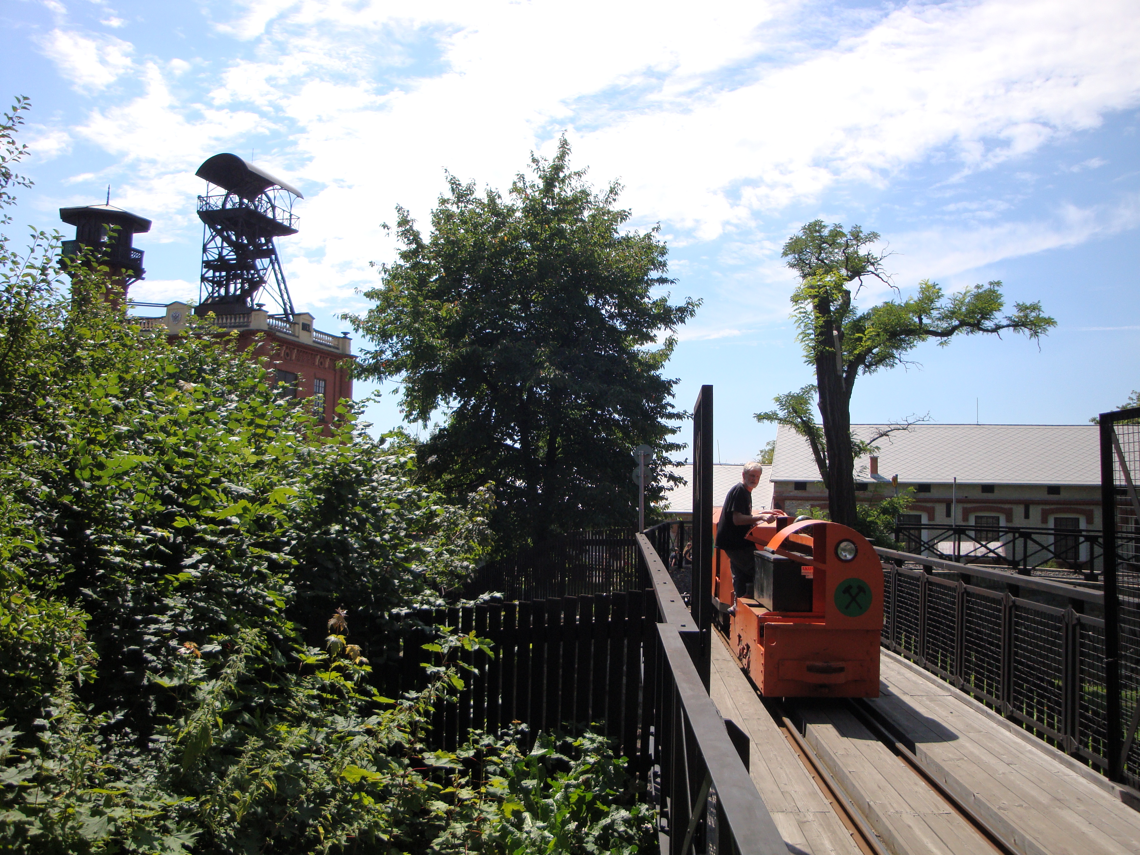 Důlní vláček opouští prostory dolu Ševčí